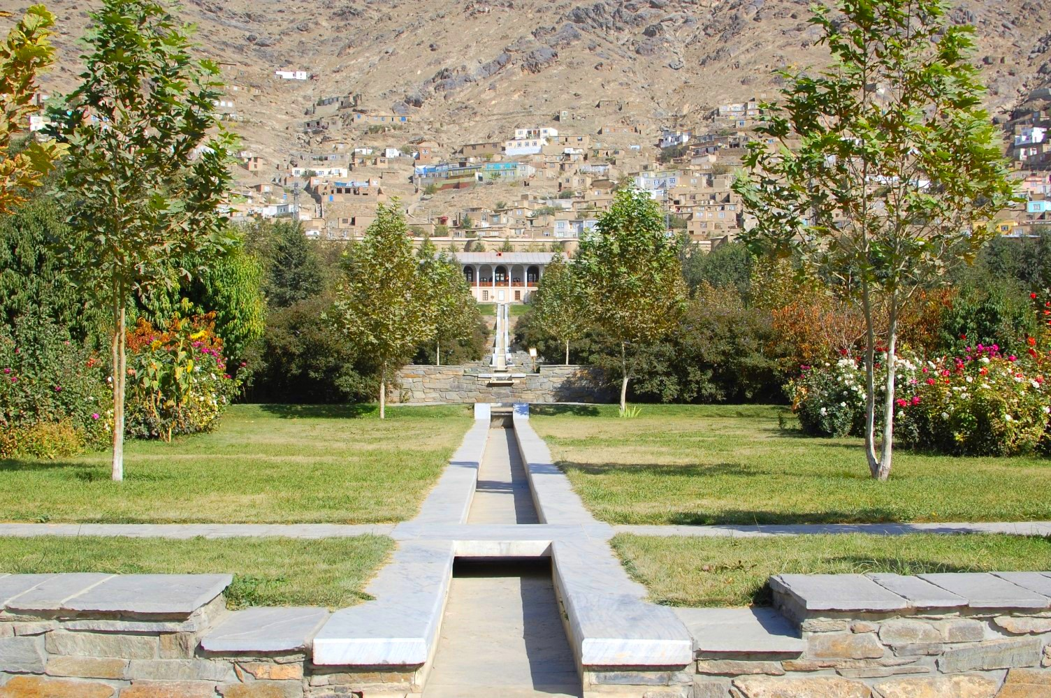 Babur Gardens